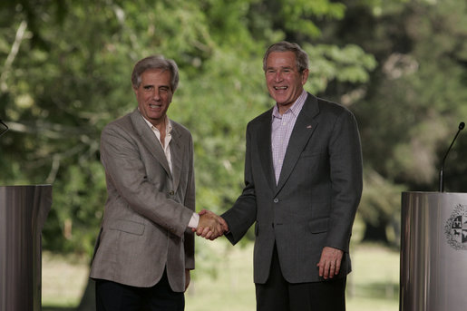 Bush_vazquez.jpg